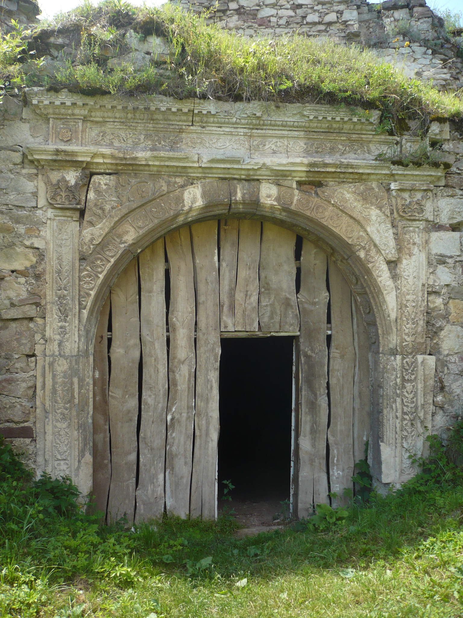 Jazłowiec. Zamek